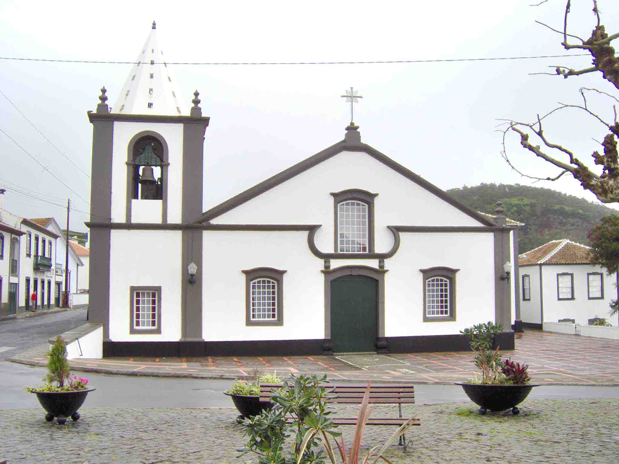 Igreja de Santa Bárbara, freguesia de Santa Bárbara, ilha Terceira, Açores, Portugal.